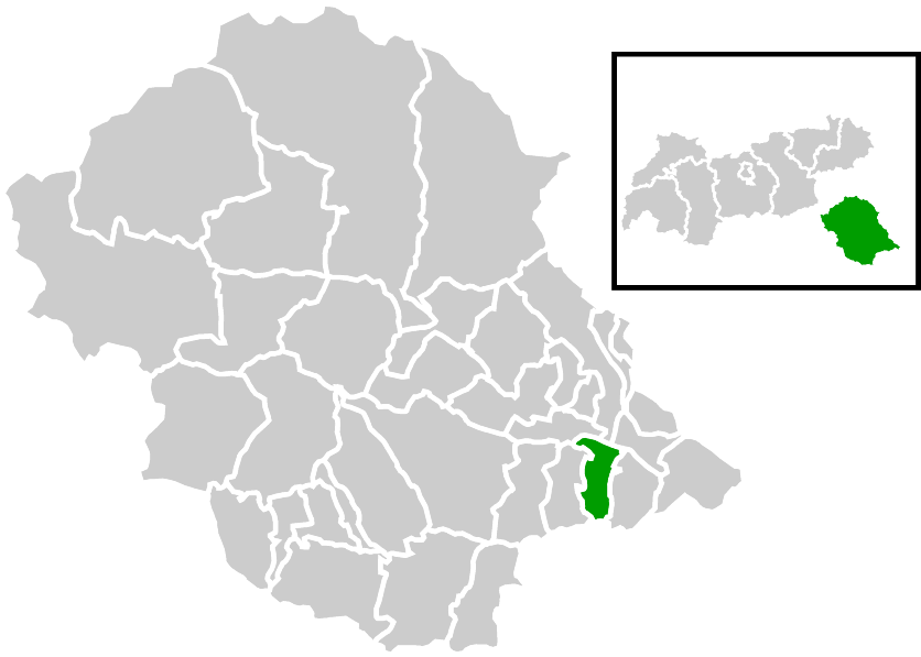 Lage der Gemeinde innerhalb des Bezirks Lienz